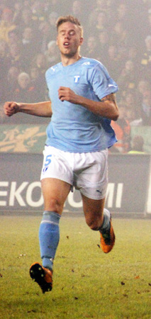 Pontus Jansson